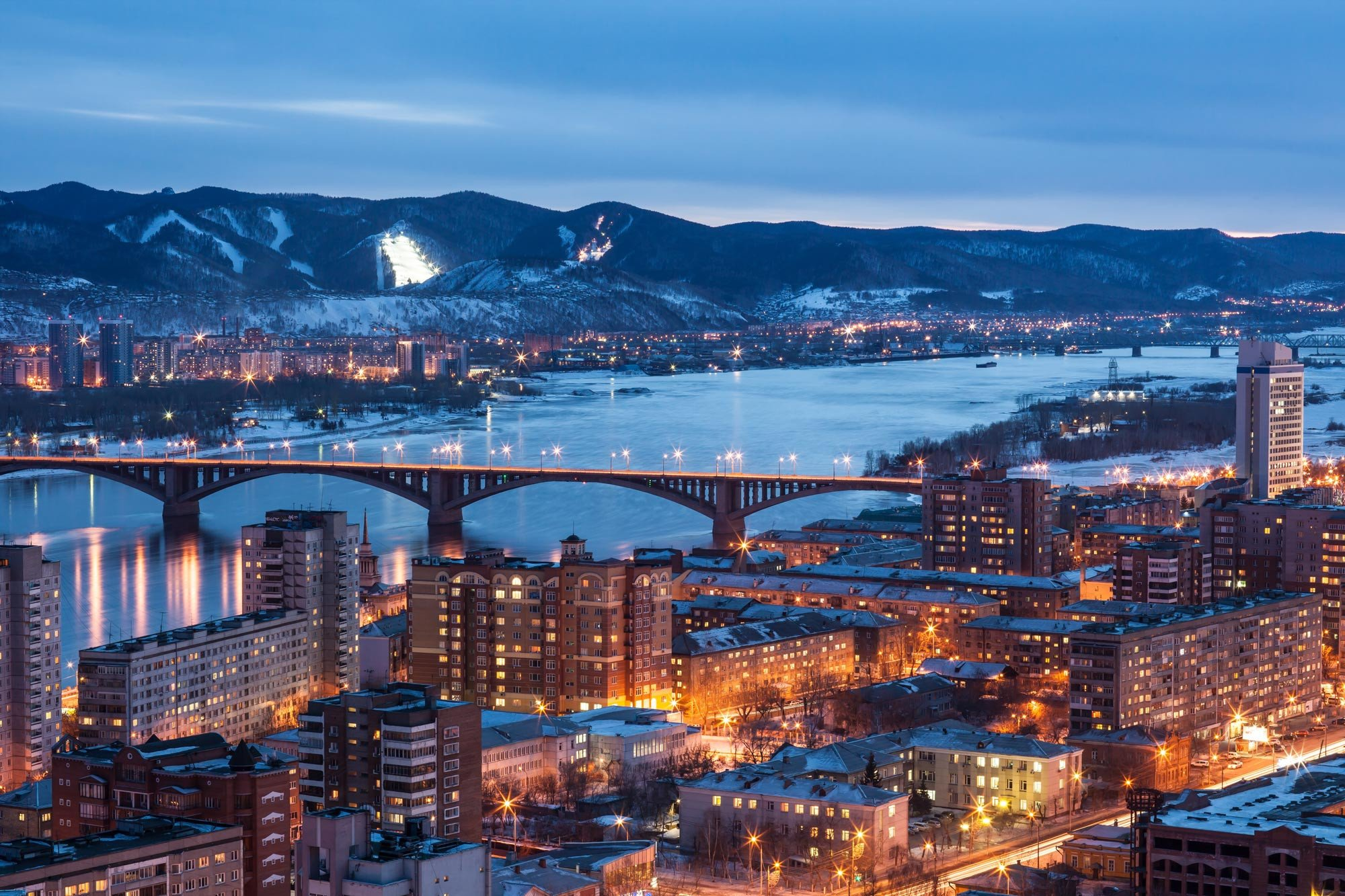 Красноярск (ночной)